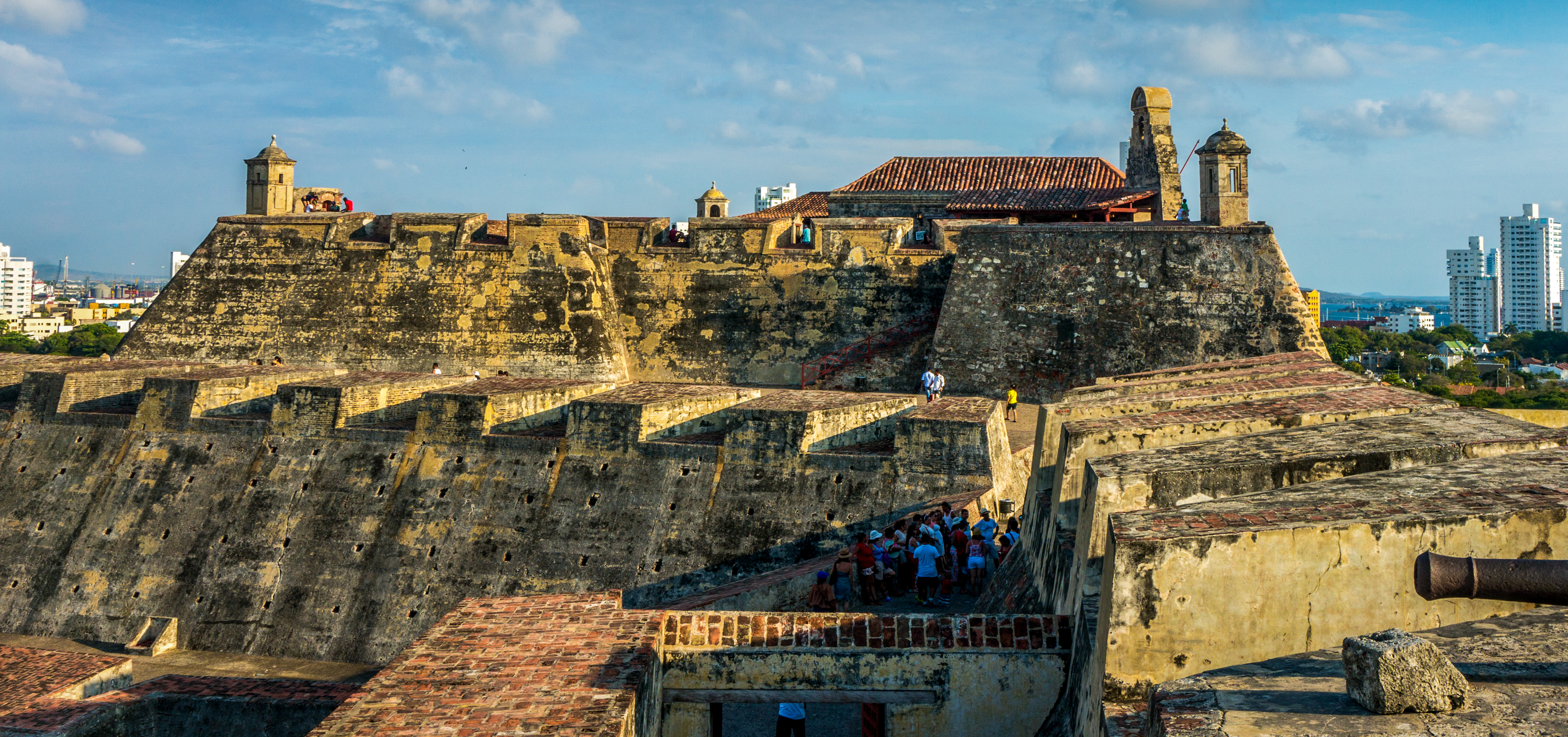 Castillo de San Felipe de Barajas y las baterías colaterales